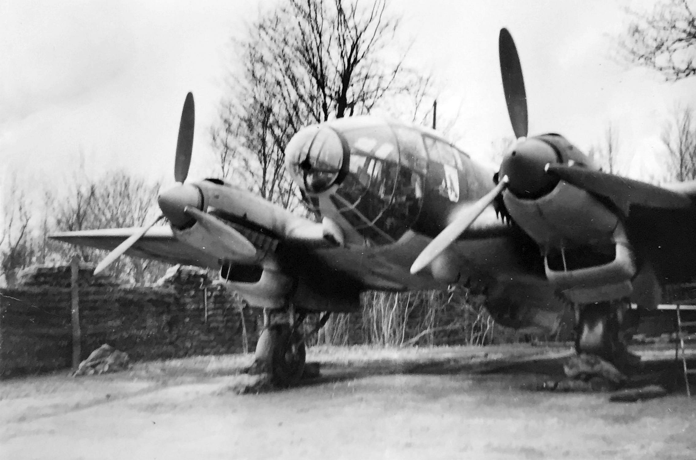 Heinkel HE-111 auf Feldflugplatz Nordfrankreich (1940)